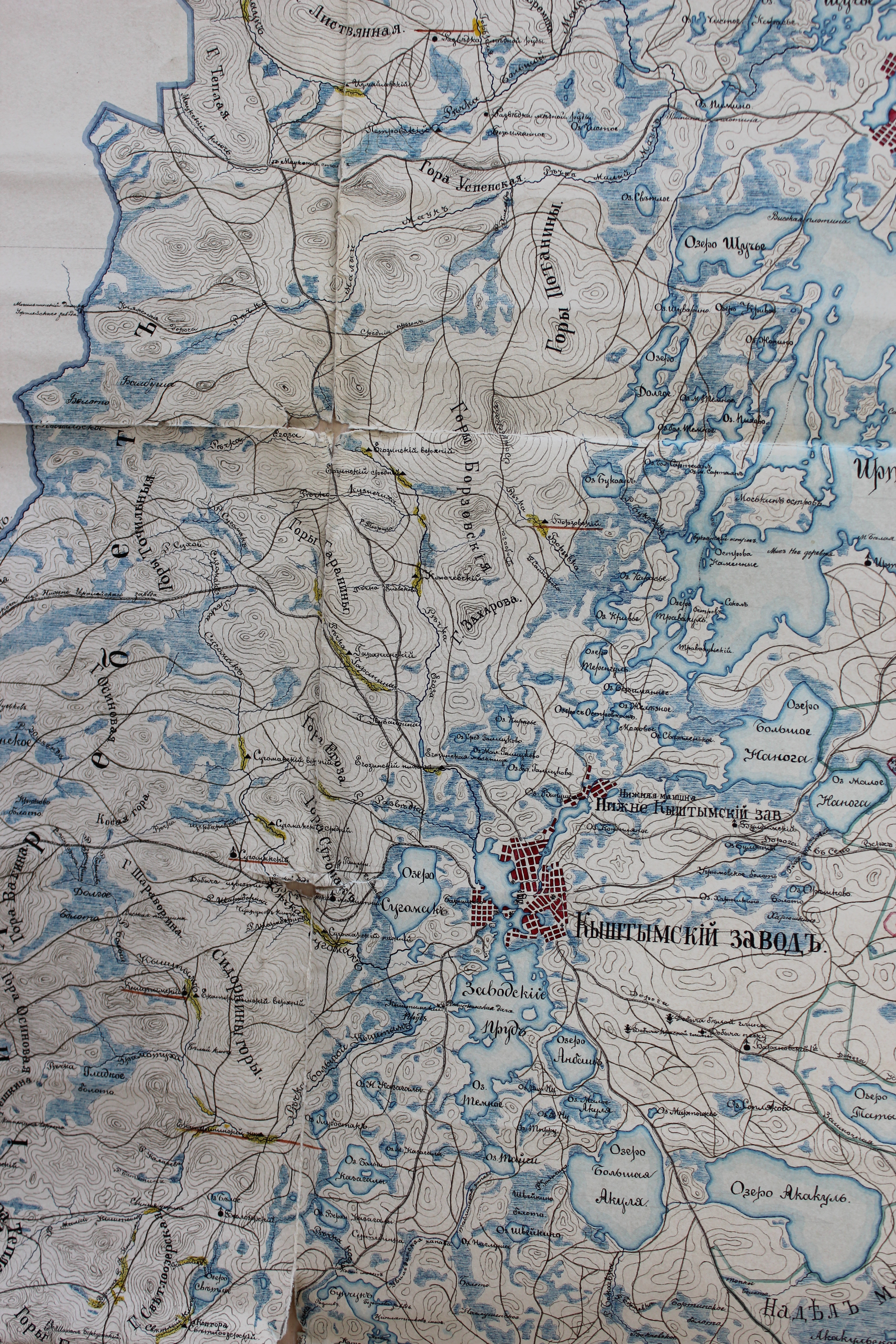 Карта хранится в архиве Челяб. Обл.